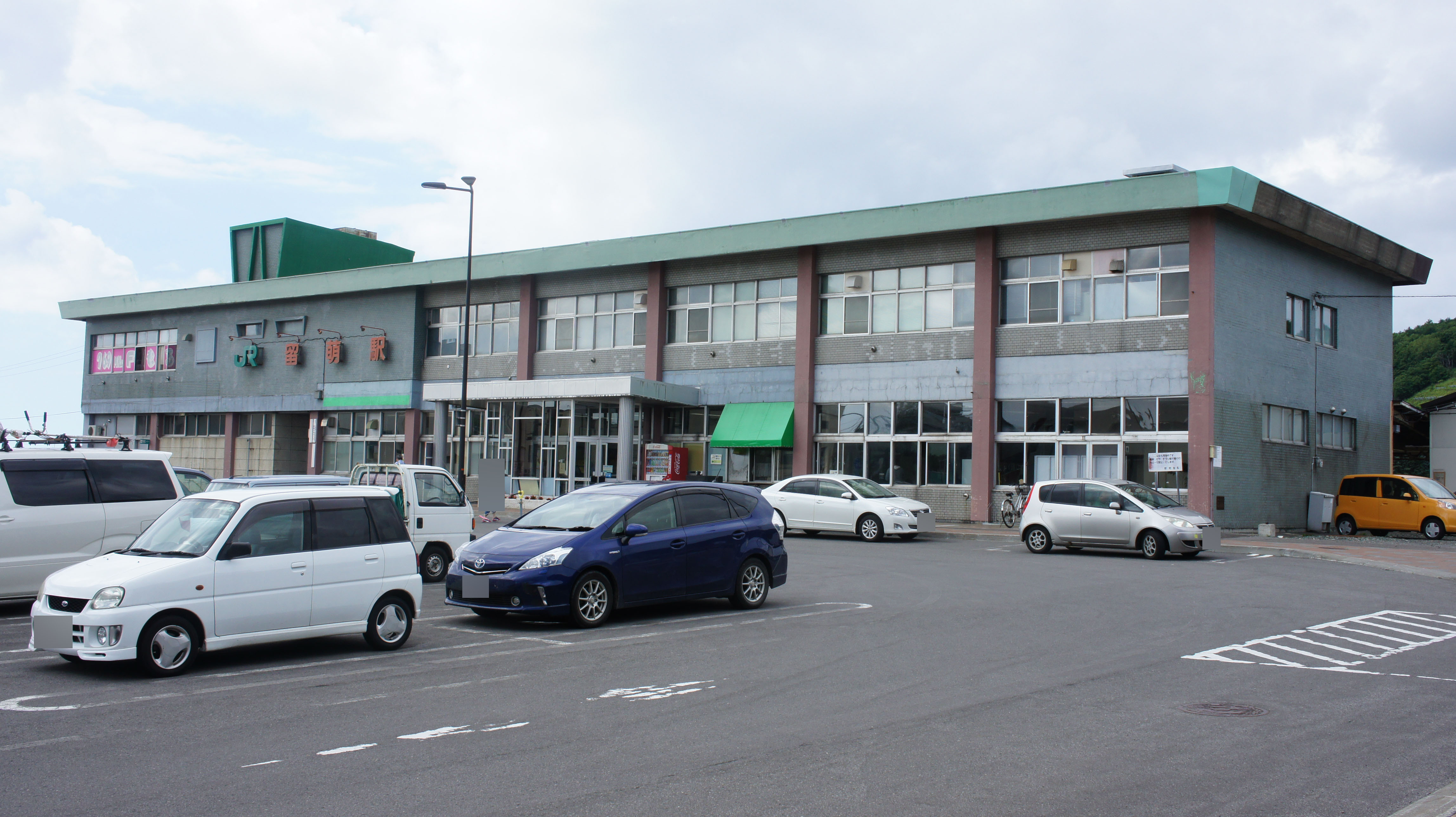 JR留萌本線・留萌駅の駅舎